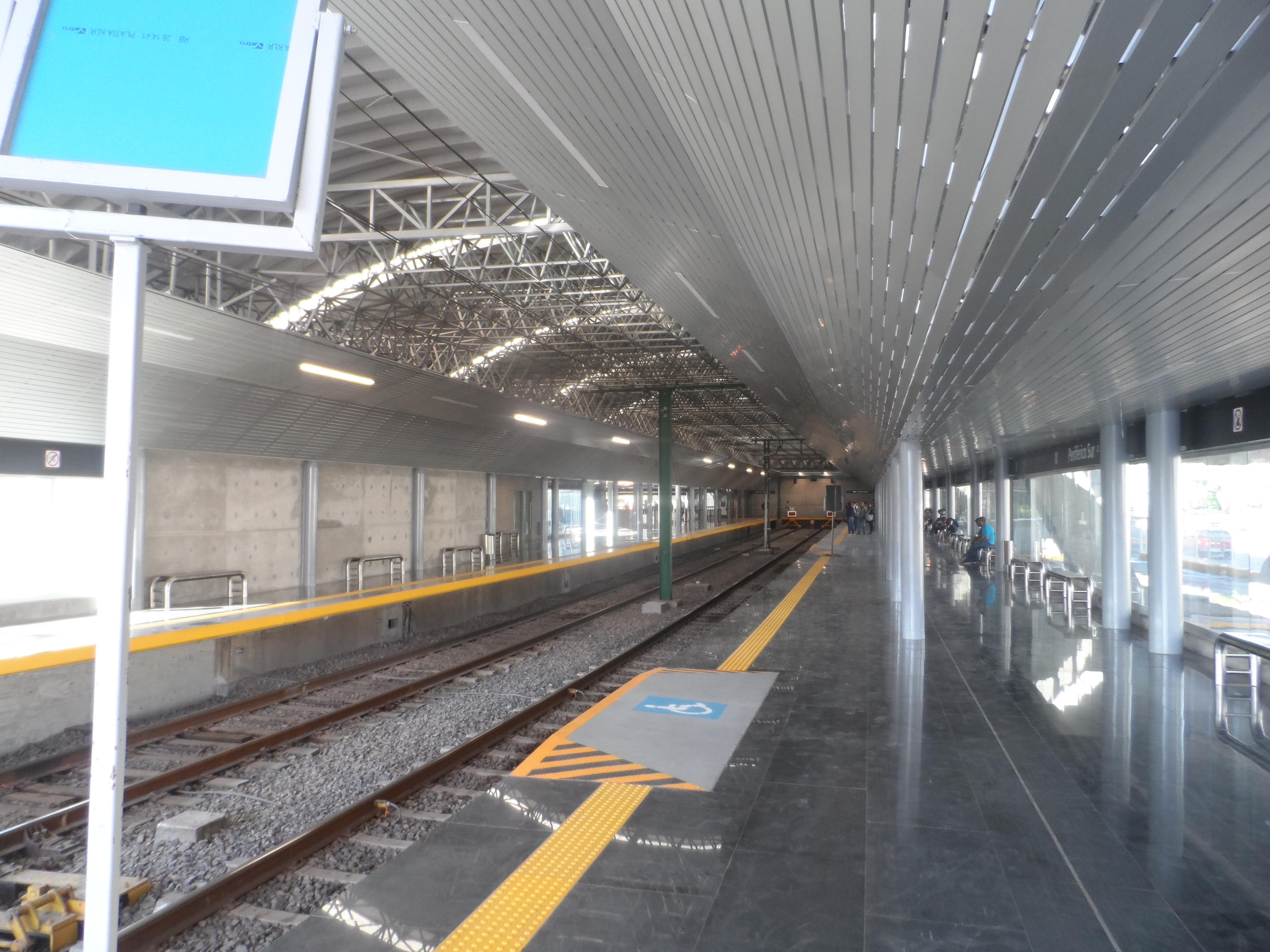 Andenes de la estación Periférico Sur (ya remodelada) de la Línea 1 del Tren Ligero de Guadalajara.